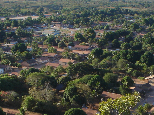 Cidade vista do morro.